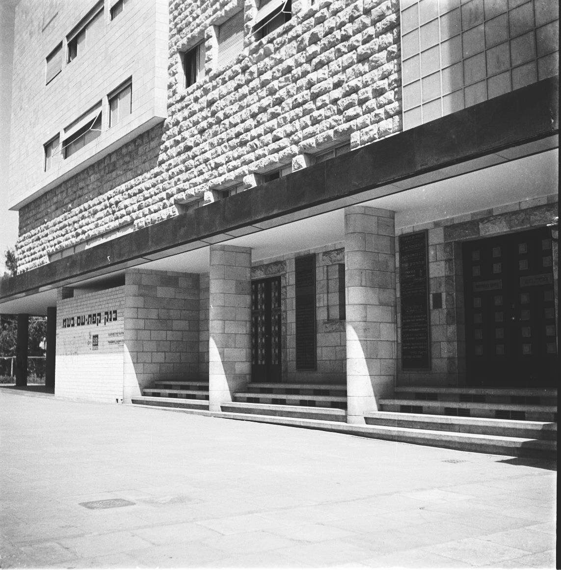 אוסף צילומים של הצלם זולטן קלוגר טווח מספרי התשלילים 18251 - 18419: A.T.S. - חיל נשים - בבית החולים